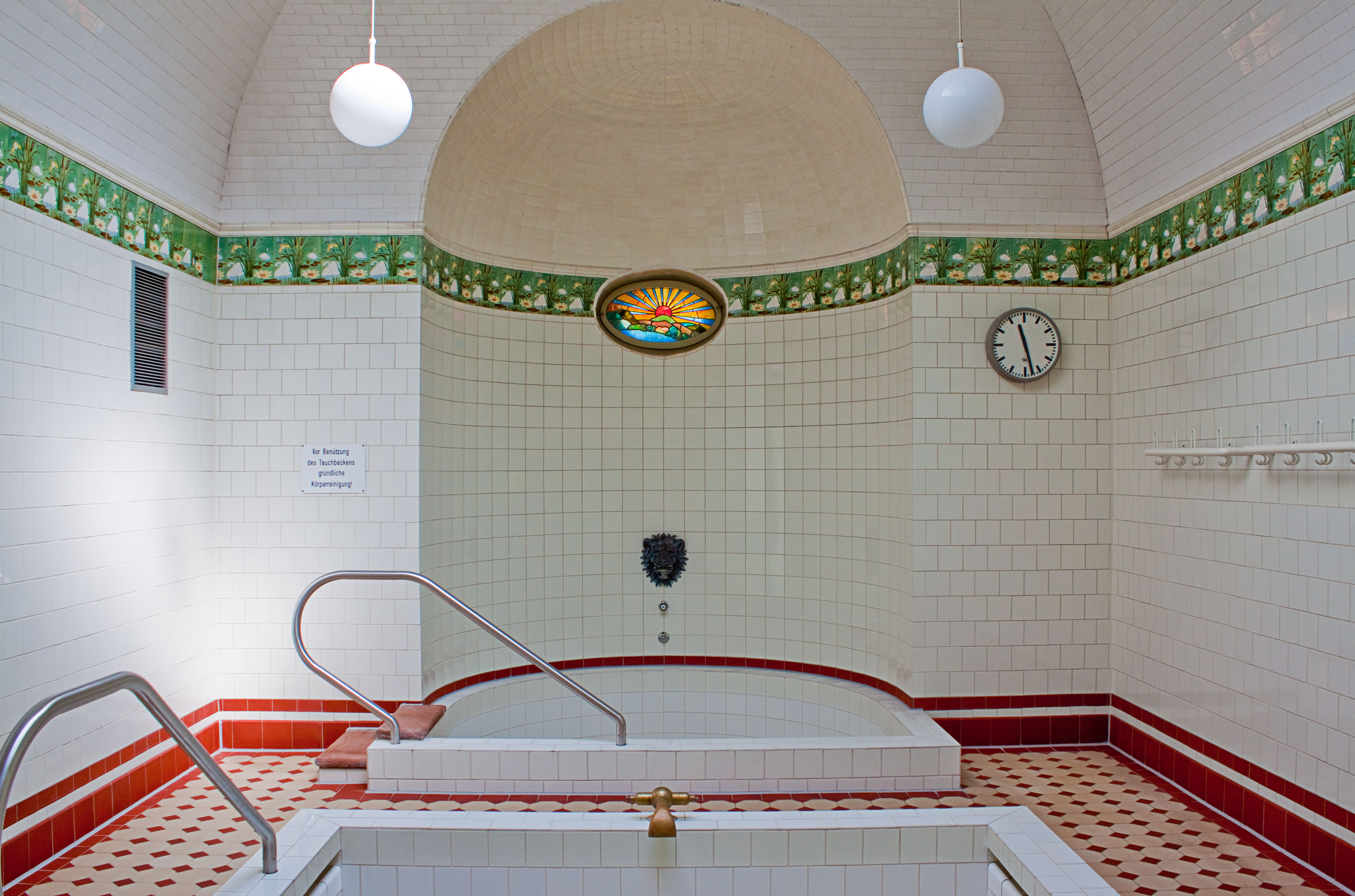 Altes Stadtbad Augsburg - Tauchbecken